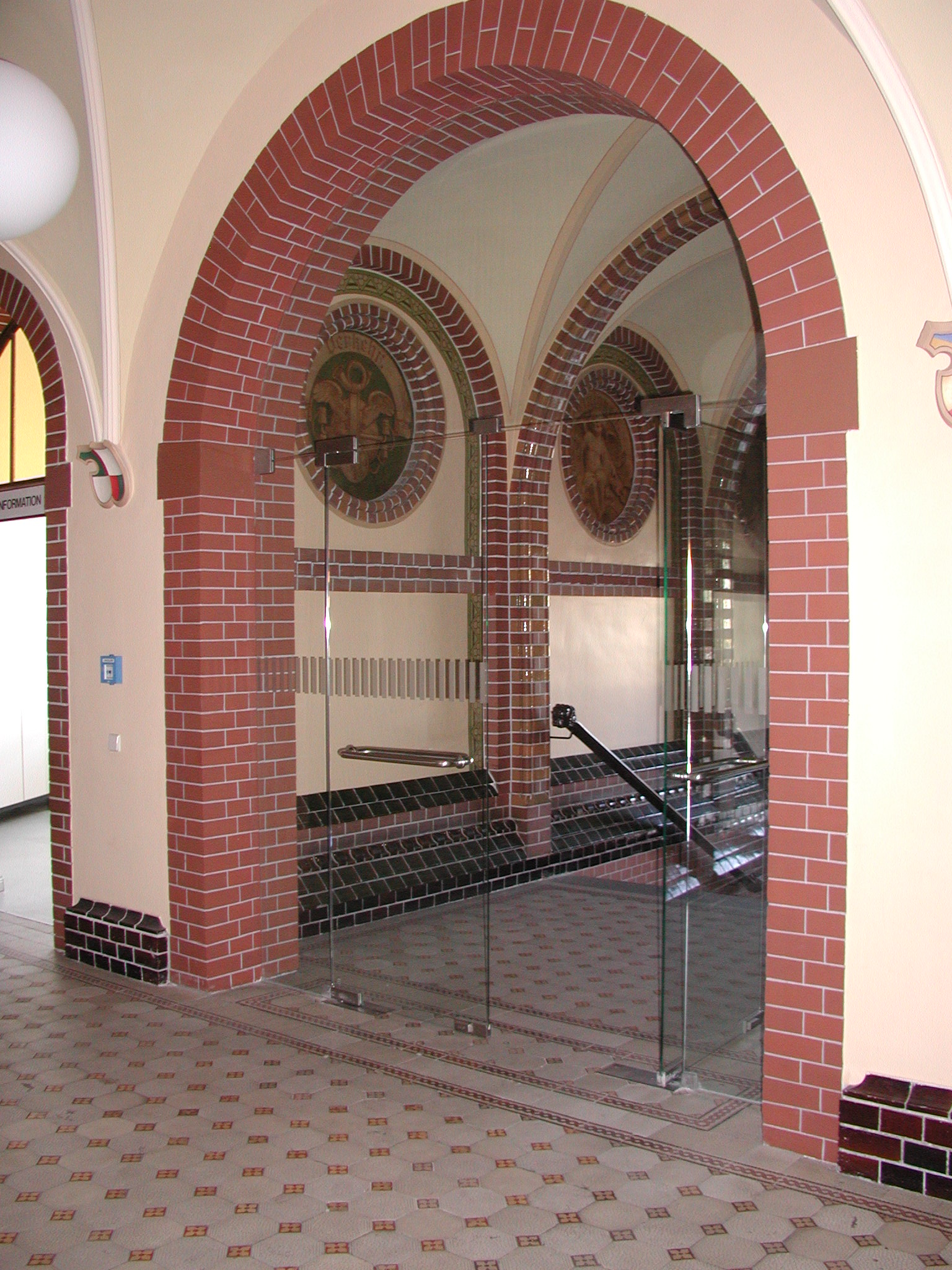 Rathaus Lichtenberg - Blick vom Foyer zur Eingangstreppe des Rathauses Lichtenberg